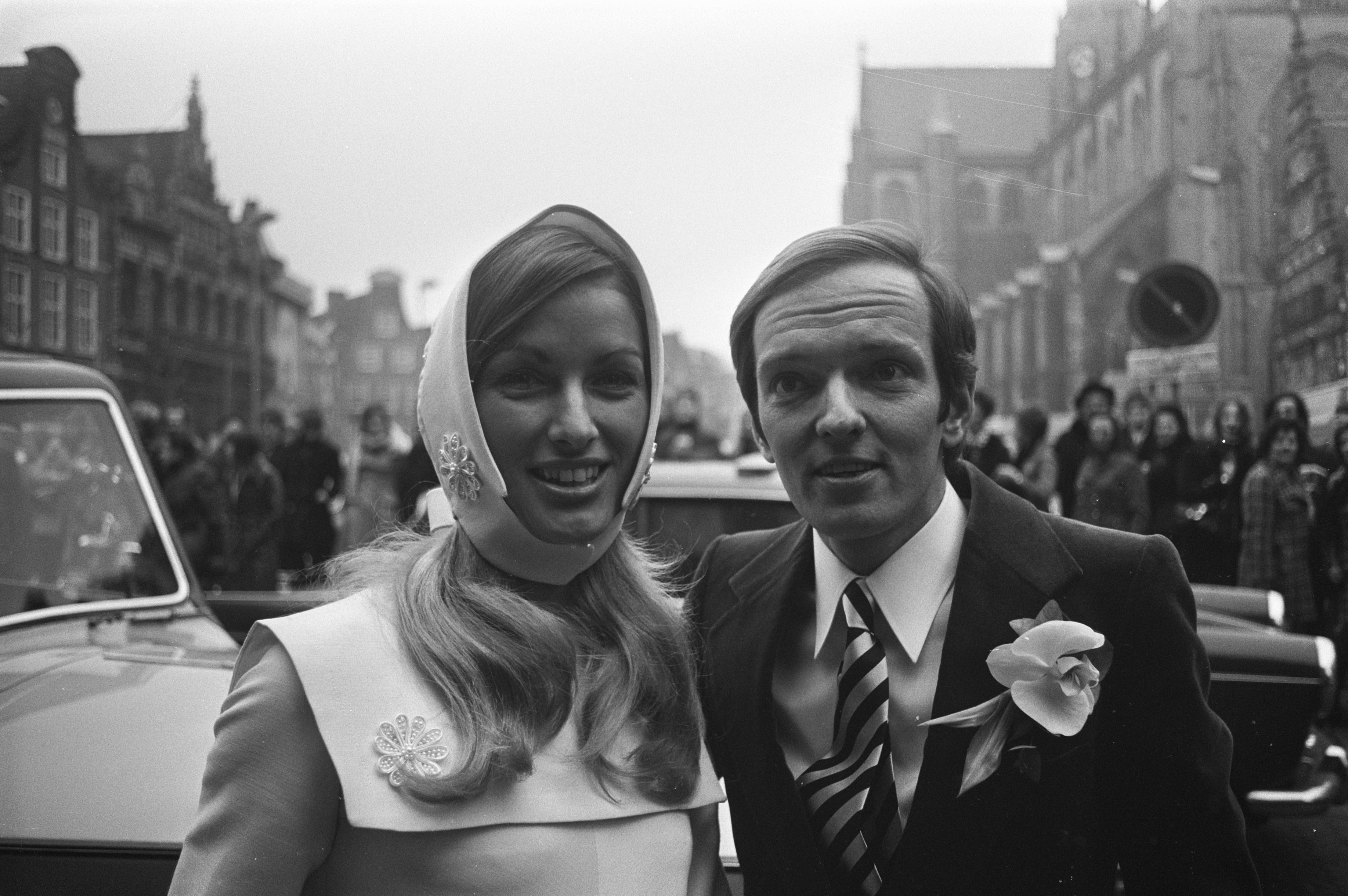 Autocoureur Liane Engeman getrouwd met Piet Hein Keijzer